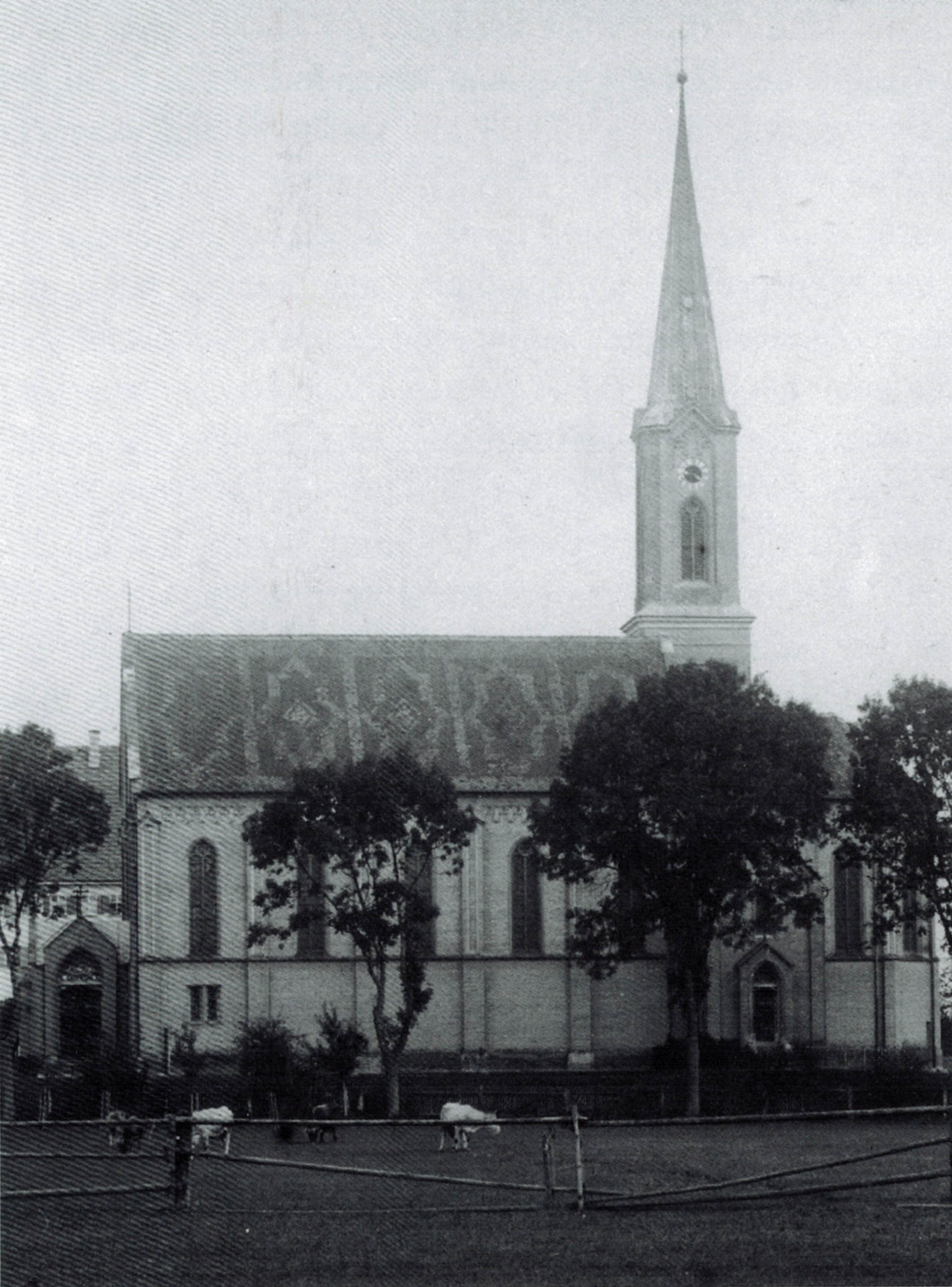 Die katholische Pfarrkirche Heiligste Dreifaltigkeit in Kriegshaber, neugotisch, vor Umbau und Zerstörung